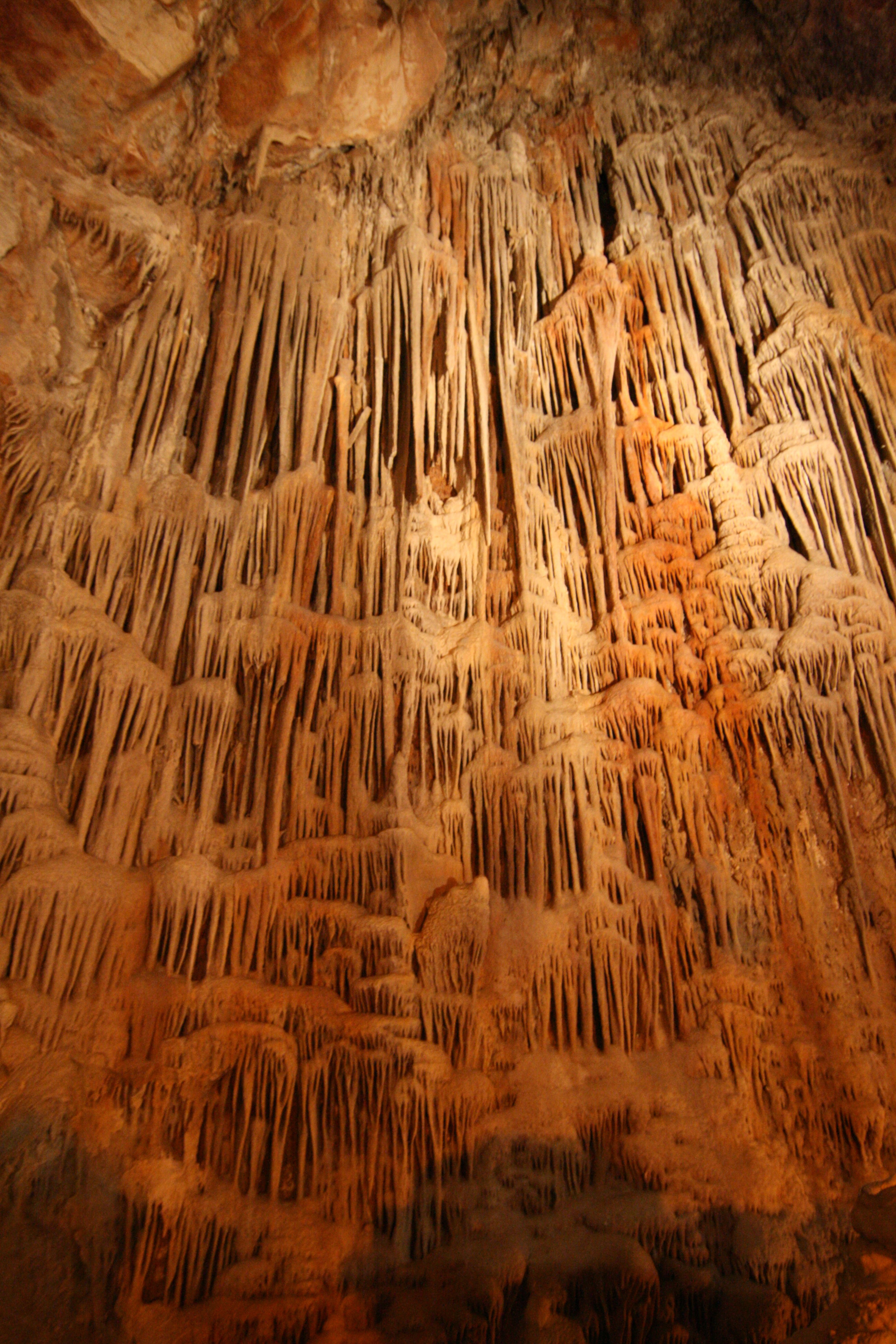 Σπήλαιο Συκιά«Σπήλαιο Συκιά»